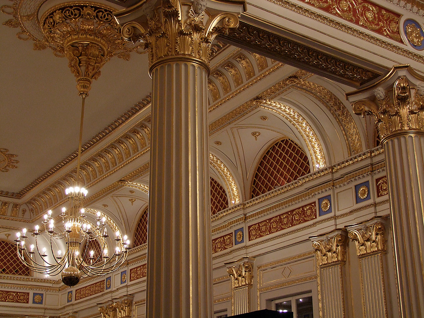 Der Goldene Saal im Neustädtischen Palais in Schwerin.